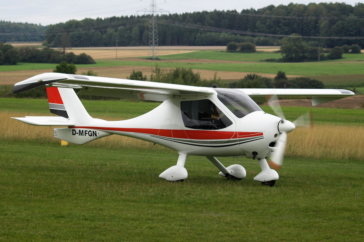 Flight Design CTSW D-MFGN